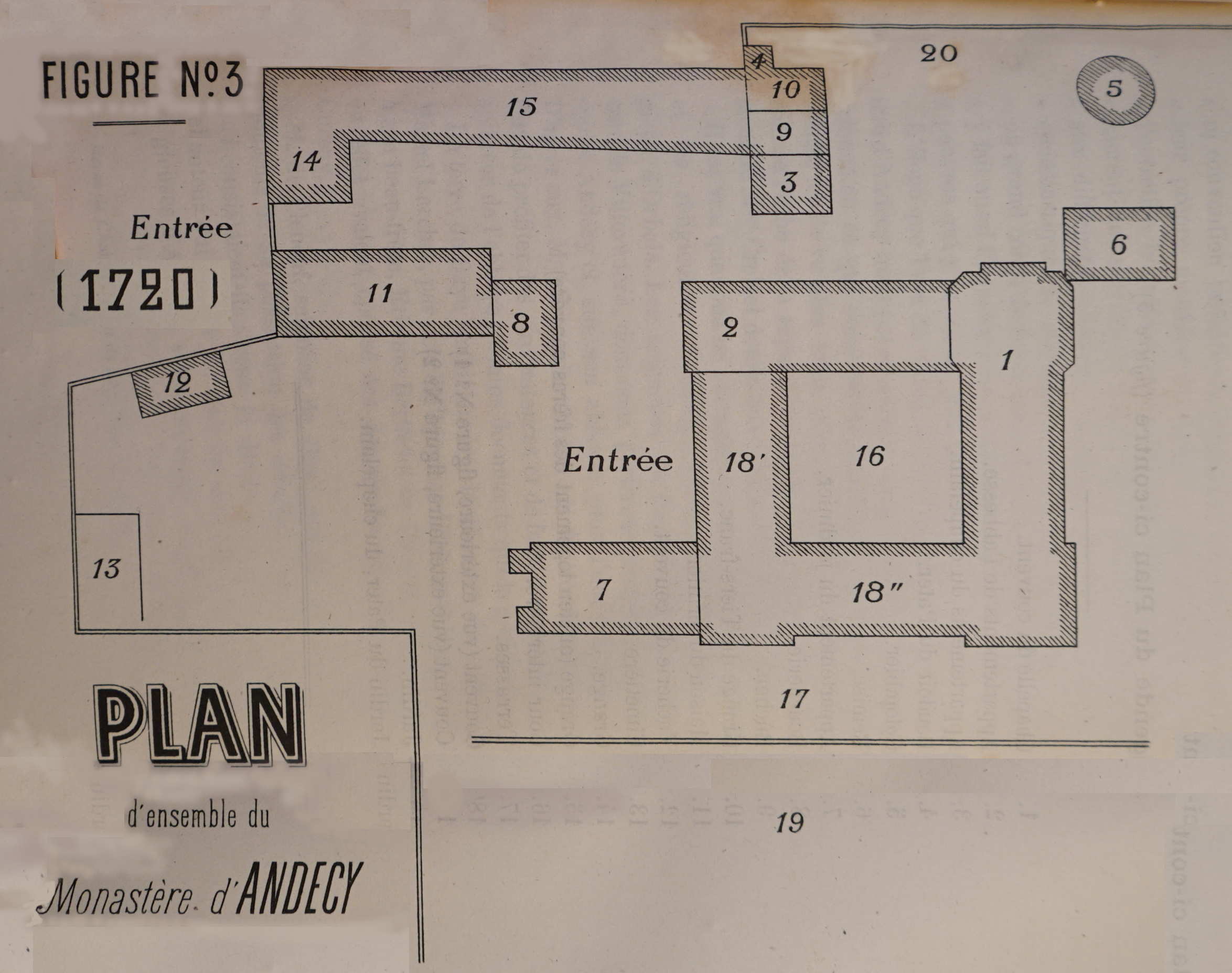 image de l'abbaye d'Andecy.